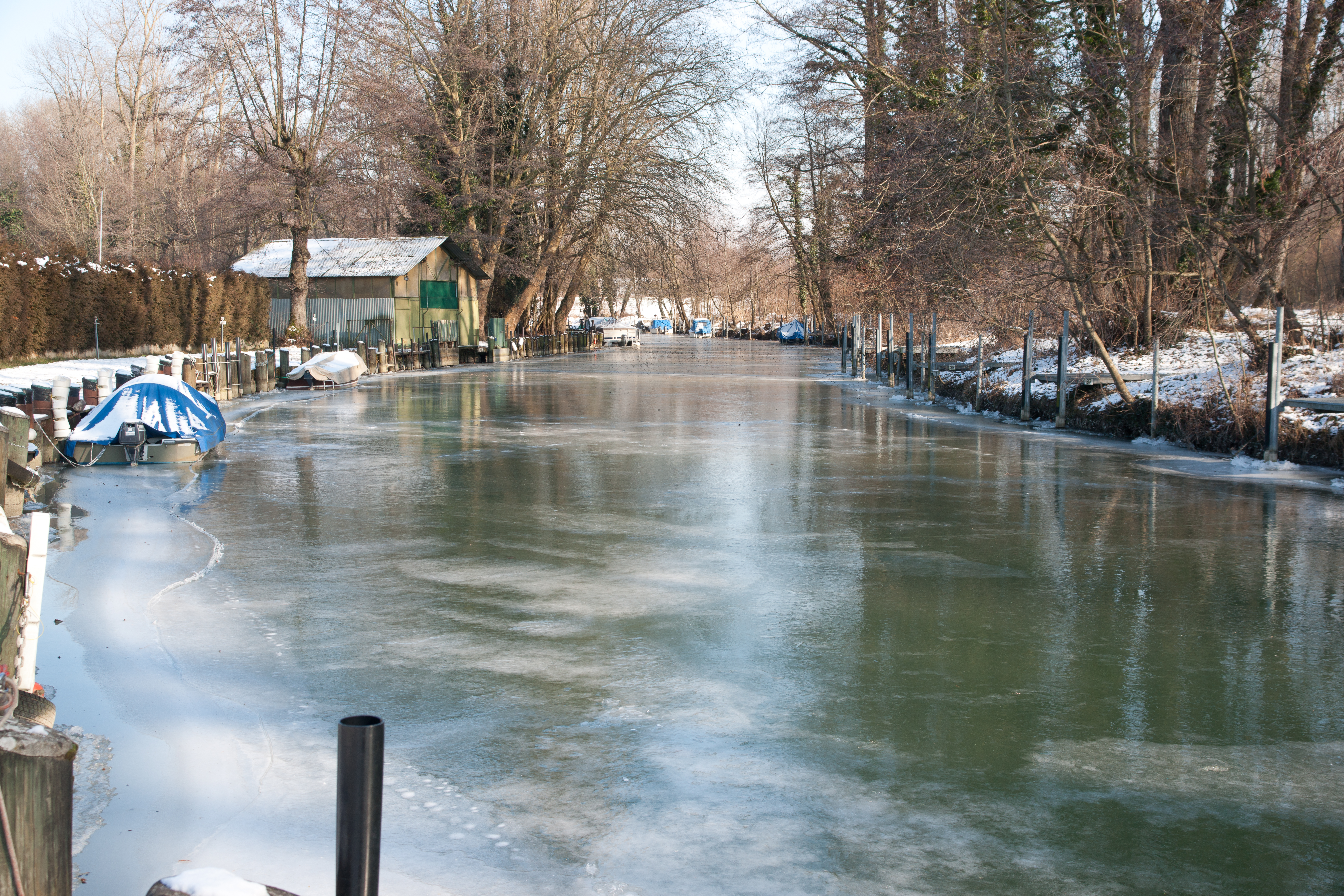 La Venoge à Saint-Sulpice. Gelée, début février 2012.